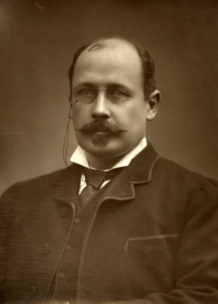 Léon Paul Blouet, pen name Max O'Rell, 1848-1903 French Writer